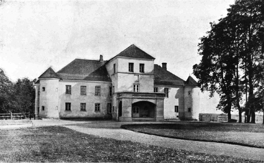 Беларуская (тарашкевіца): Гайцюнішкі (Hajciuniški)